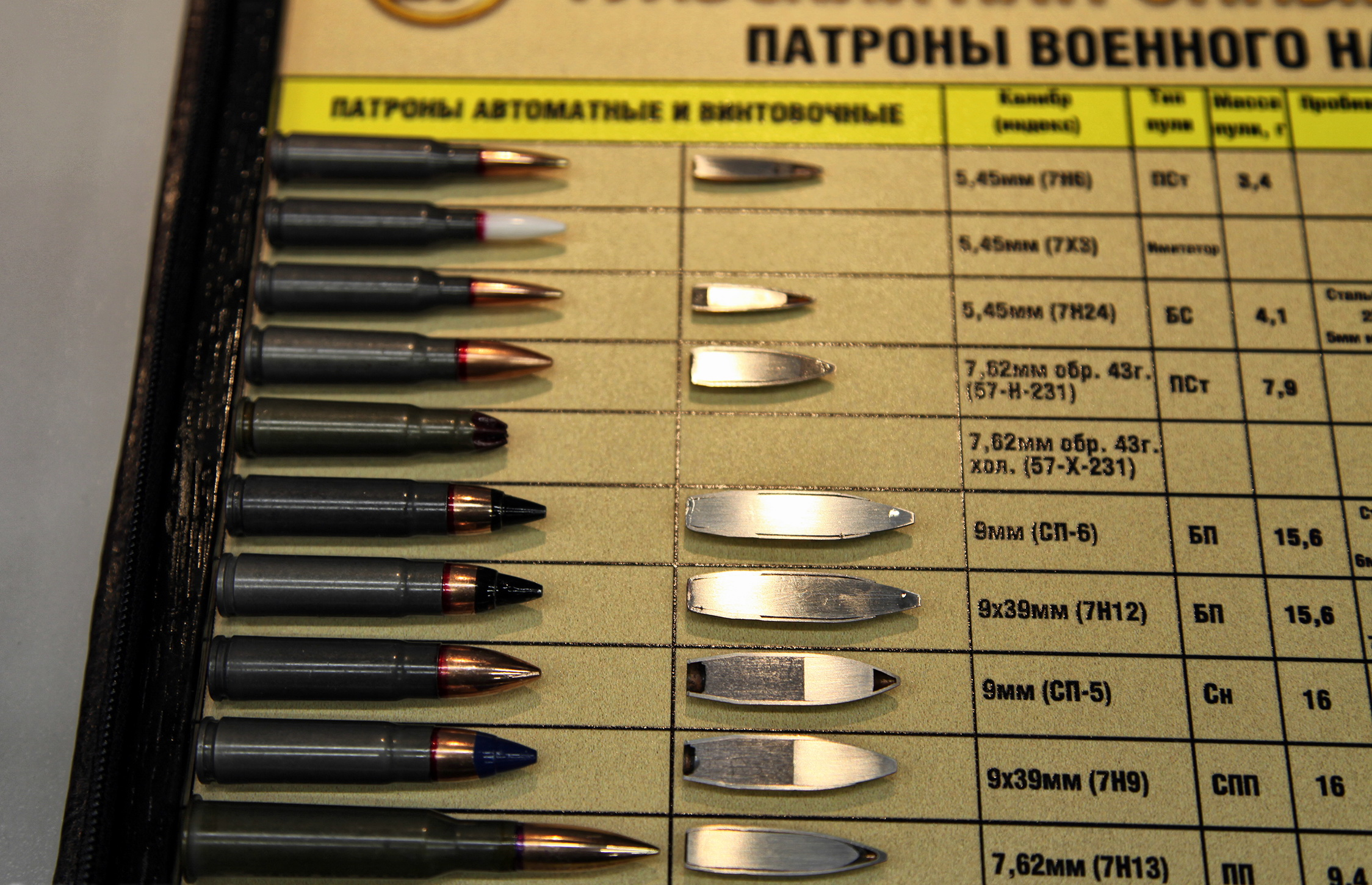 Патроны автоматные и винтовочные